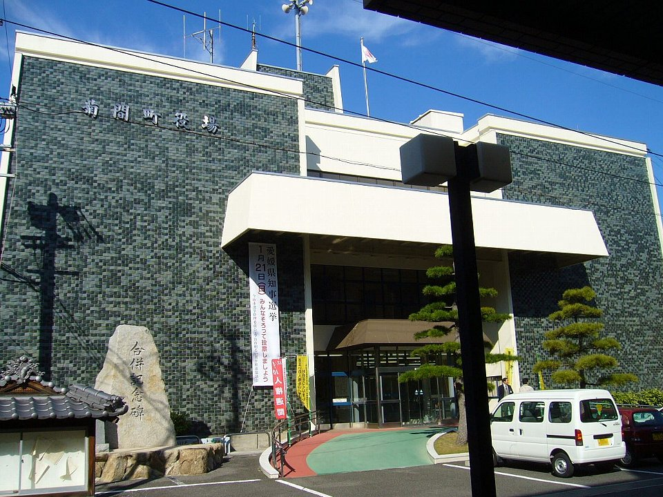 今治市菊間支所（旧・菊間町役場） 撮影当時は今治市合併から1年11ヶ月経過しているが、「菊間町役場」の表記が残っていた